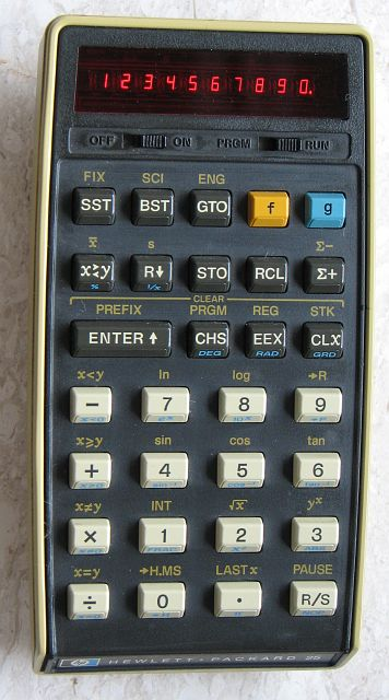 HP-25 calculator - front view